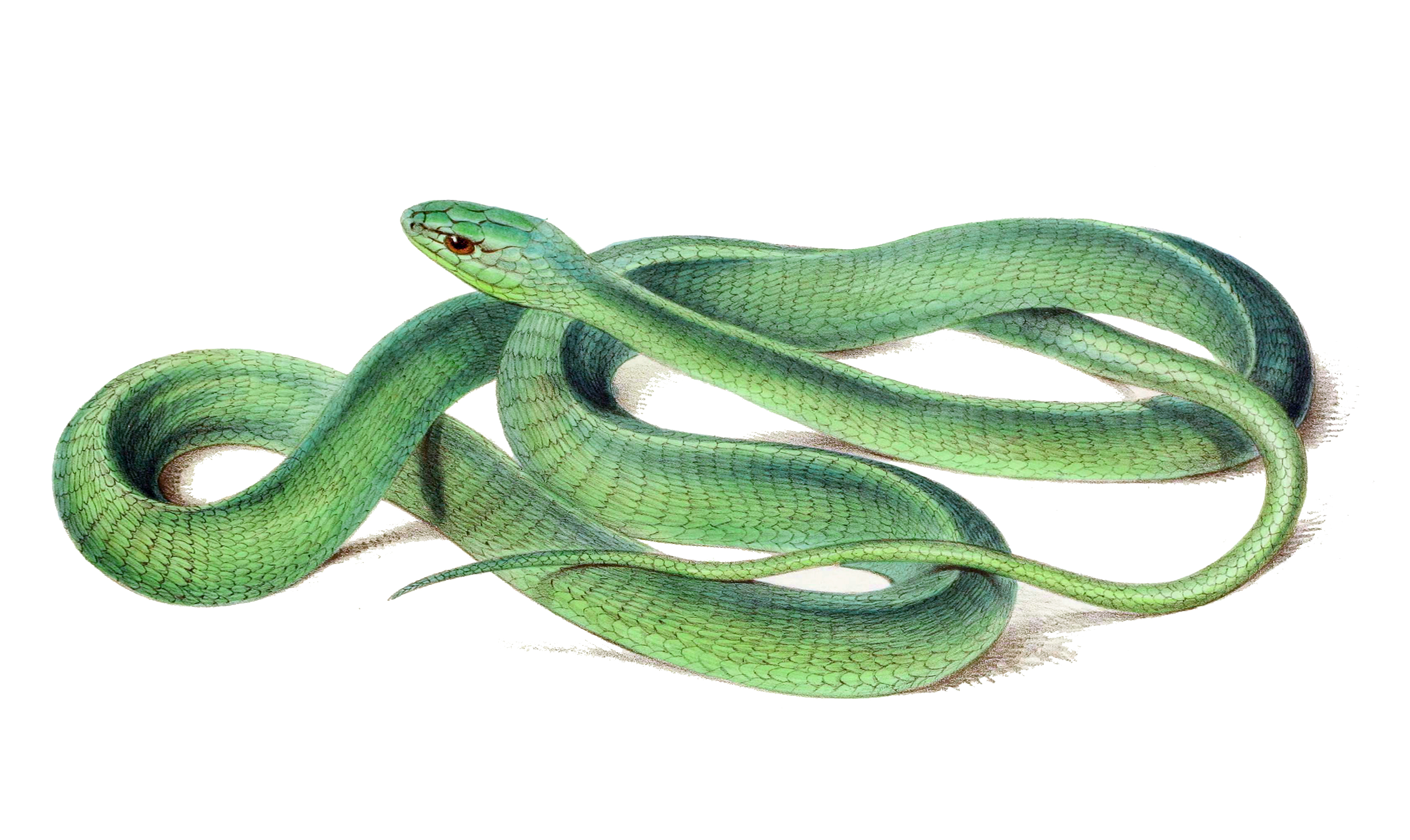 Dispholidus typus